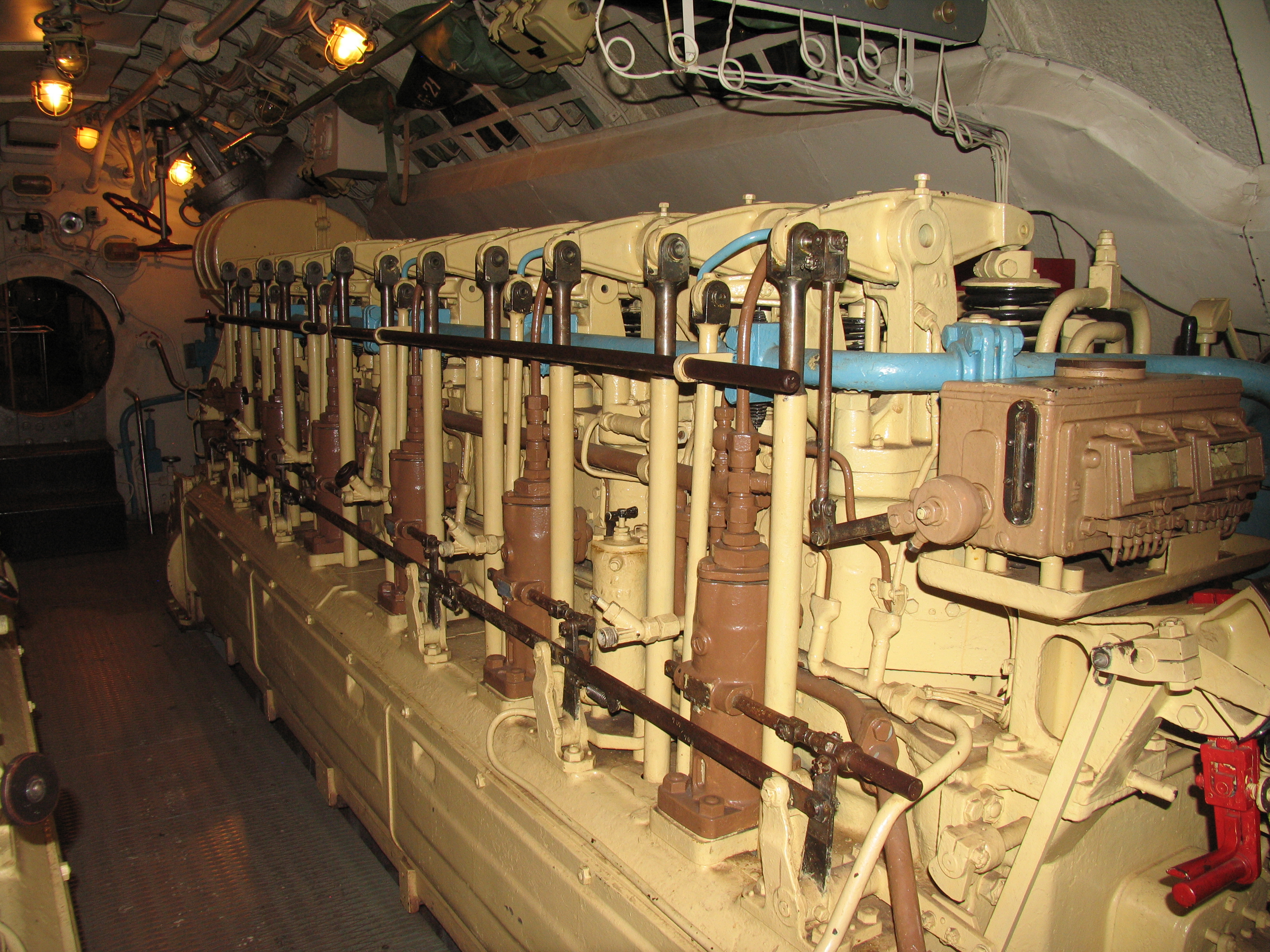 Подводная лодка Д-2 «Народоволец». Шестой (моторный) отсек. Левый дизель. Вид в сторону кормы.